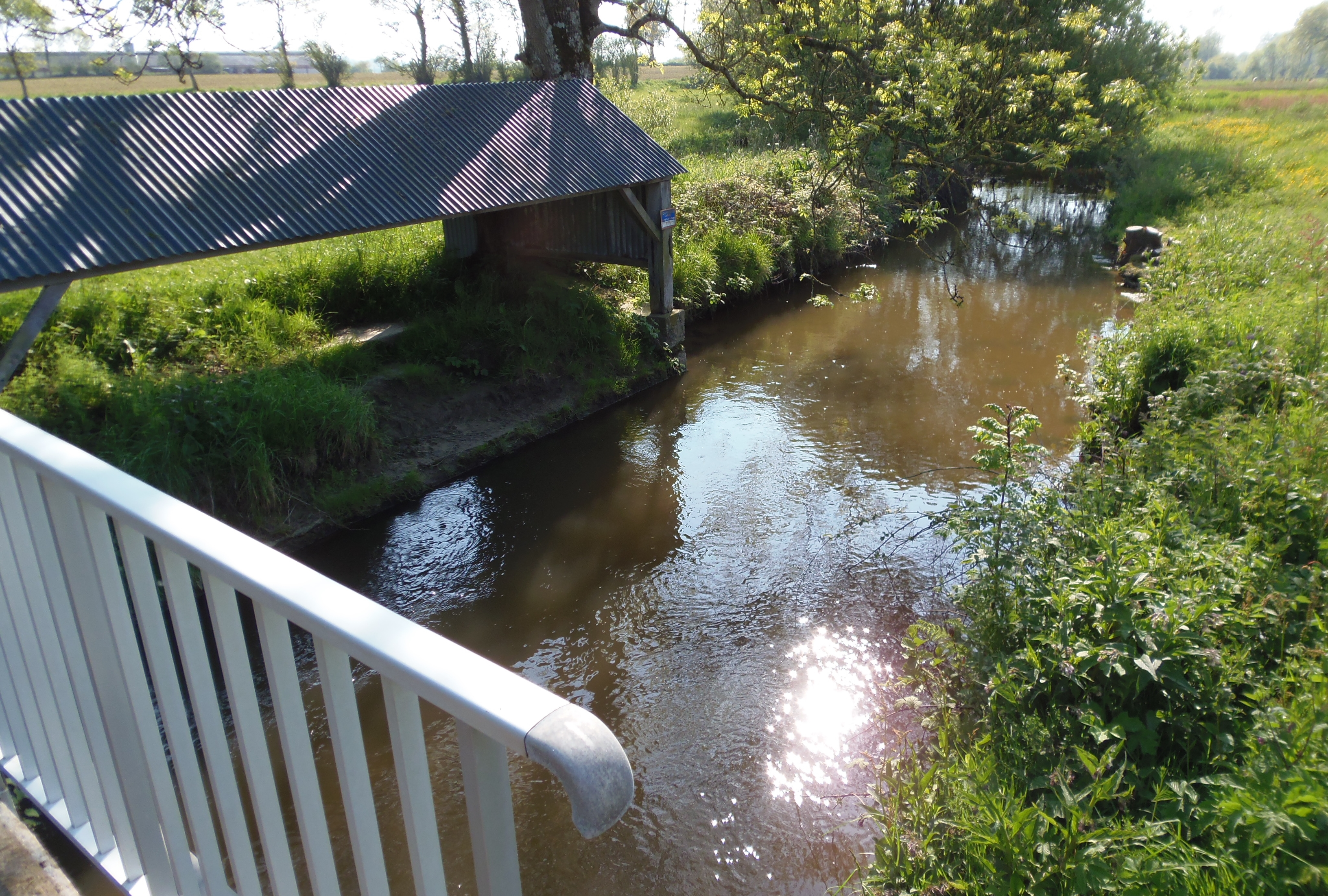 La Sènène à Beslon (Normandie, France).